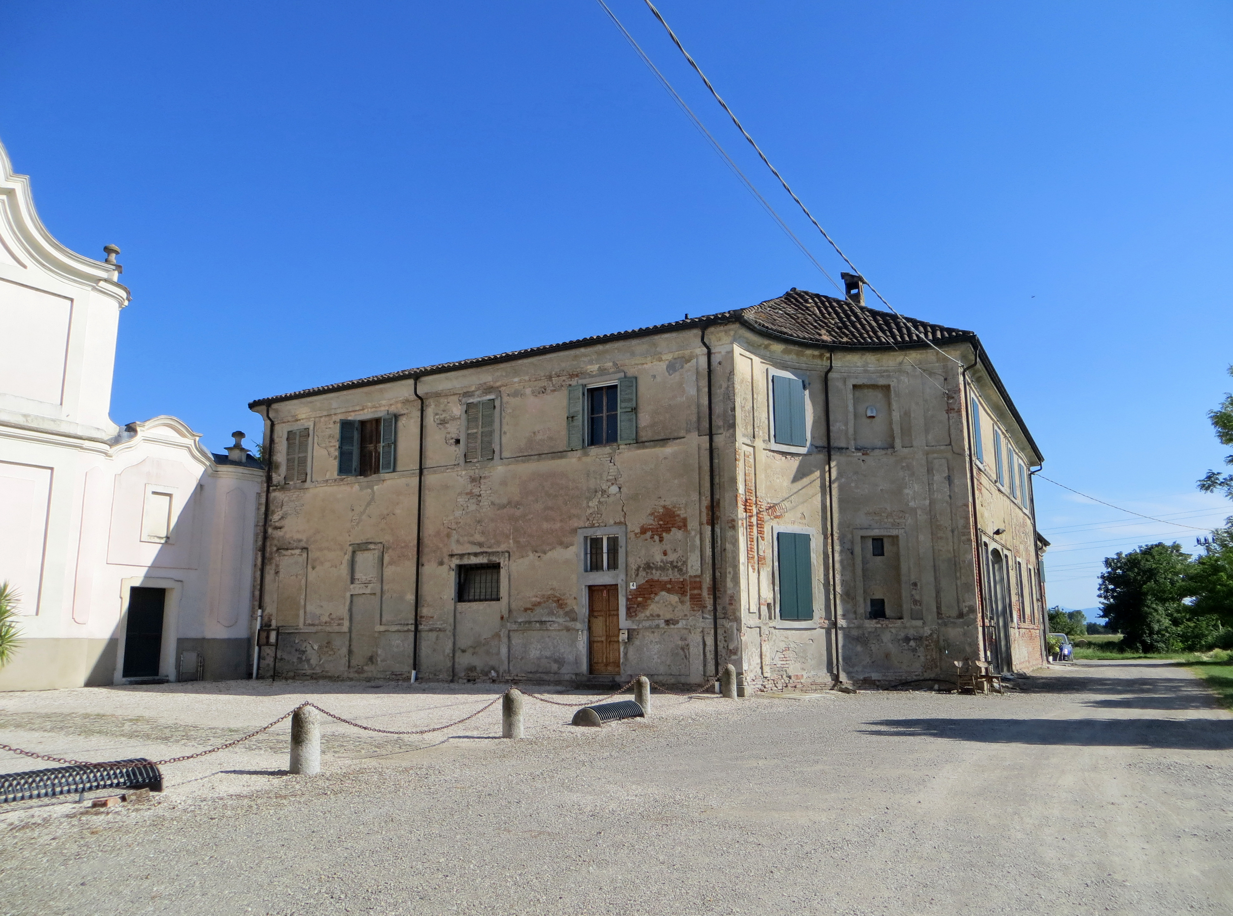 Chiesa di San Benedetto (Priorato, Fontanellato) - edifici di servizio